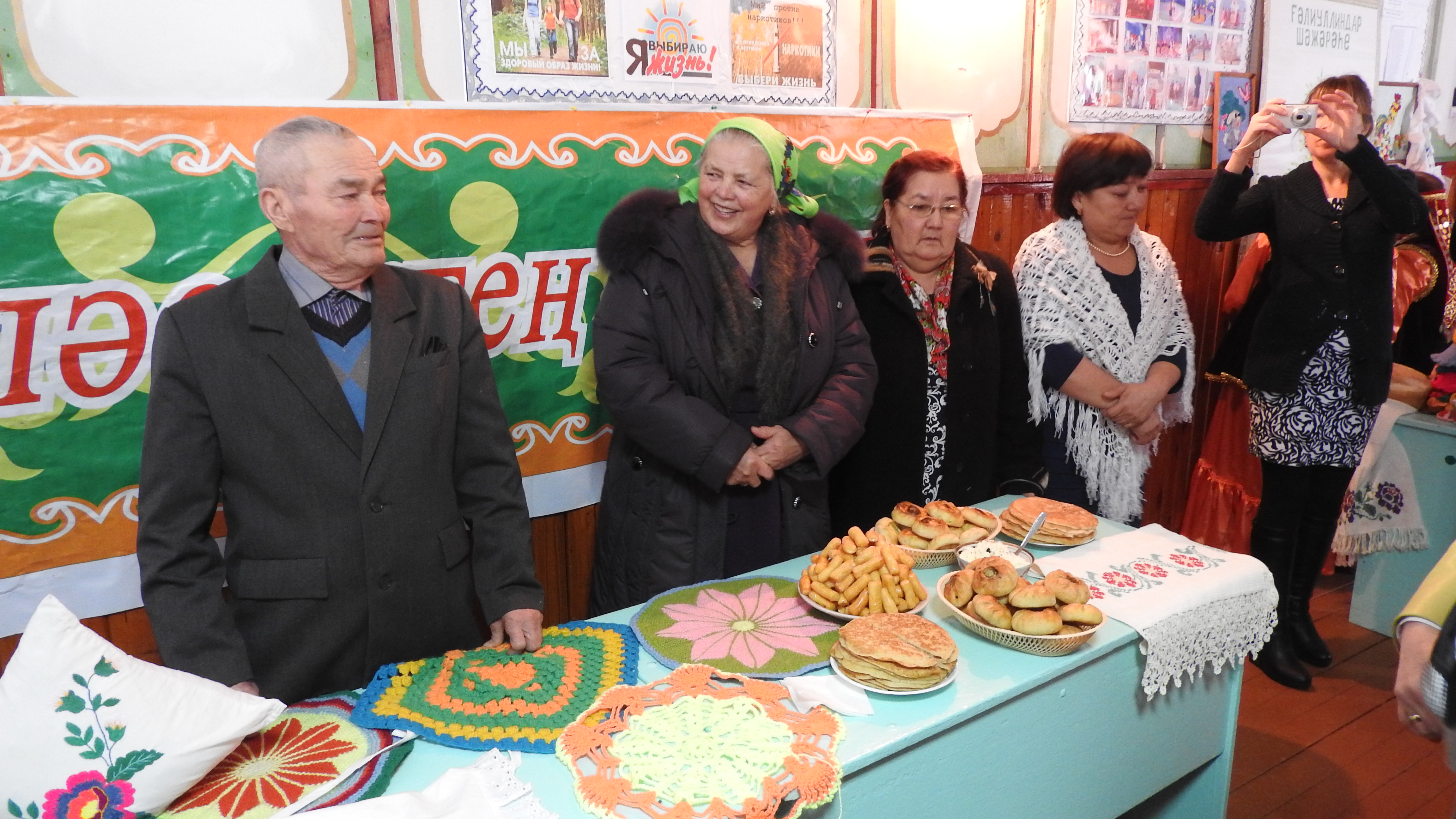 Башҡортса: Ауырғазы районы Өсбәлеш ауылы. Үтәймулла ауылында Шәжәрә байрамы, 15 февраль 2017 йыл.